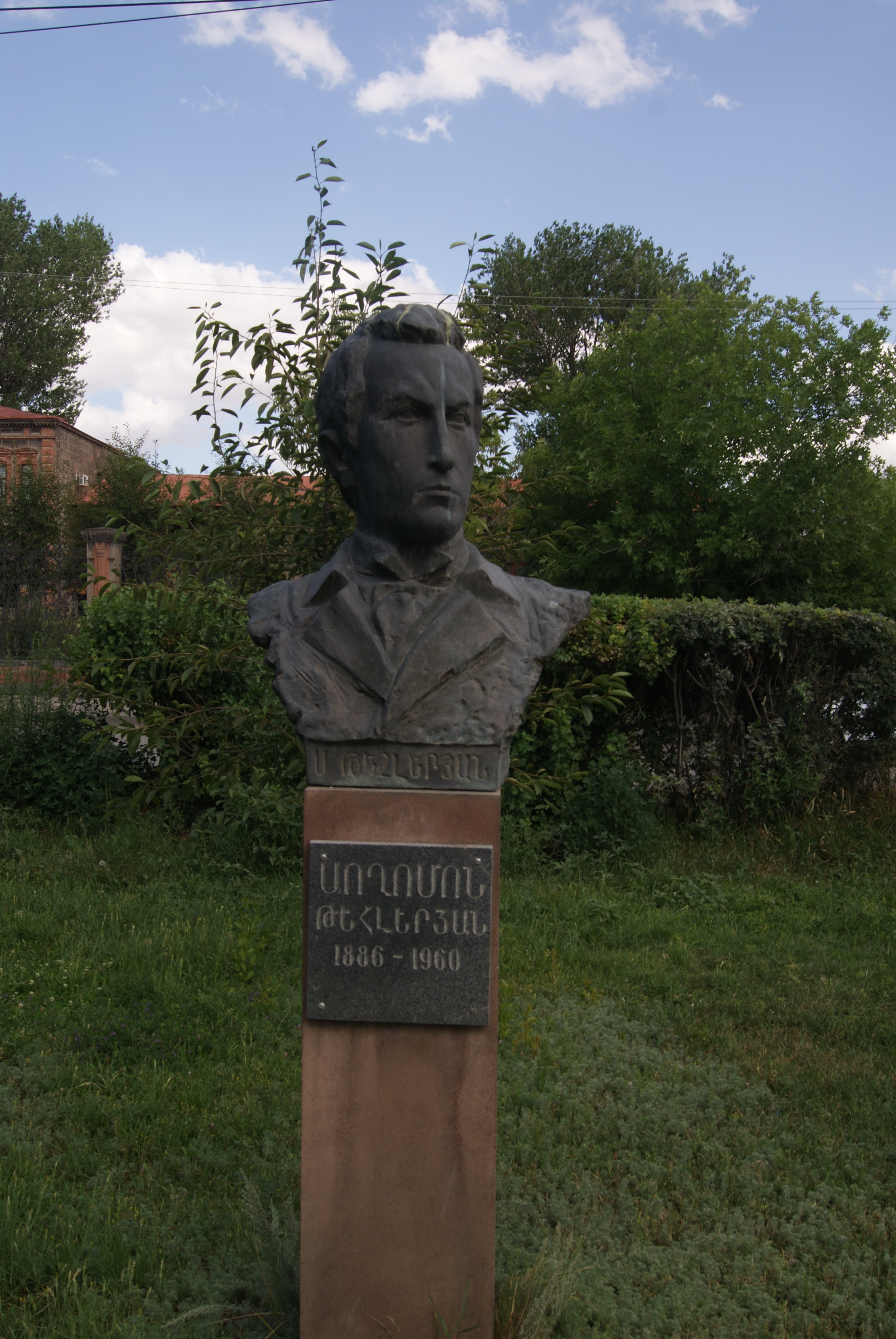 Bust of Soghomon Tehlirian in Gyumri, Armenia